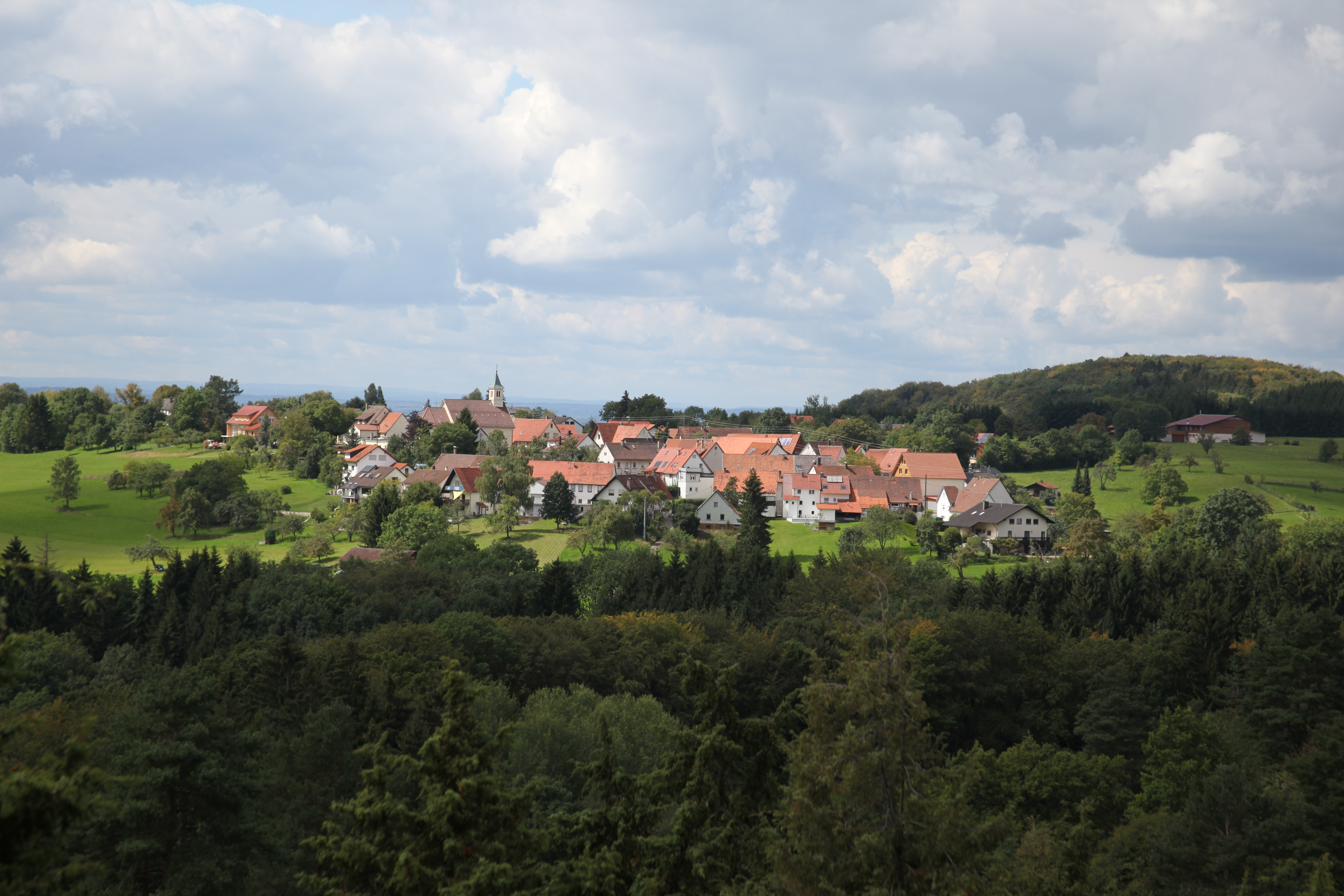 Blick auf Beuren über die Beurener Heide hinweg